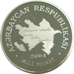 Azərbaycan Respublikasının Mərkəzi Bankı Azərbaycan xalqının ümummilli lideri Heydər Əlirza oğlu Əliyevin xatirəsinin əbədiləşdirilməsi haqqında Azərbaycan Respublikası Prezidentinin fərmanına əsasən, 10 dekabr 2004-cü ildə dövriyyəyə gümüş xatirə sikkələri buraxmışdır.